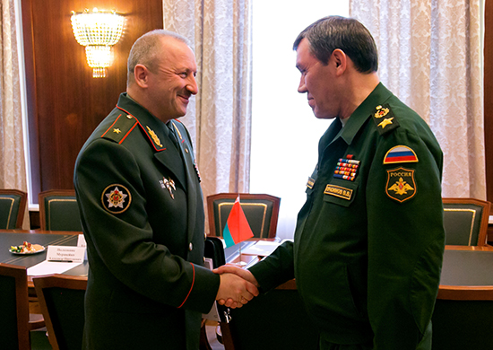 Встреча начальника Генерального штаба Вооруженных Сил Российской Федерации — первого заместителя Министра обороны генерала армии Валерия Герасимова и начальника Генерального штаба Вооруженных Сил Республики Беларусь – первого заместителя Министра обороны генерал-майора Олега Белоконева